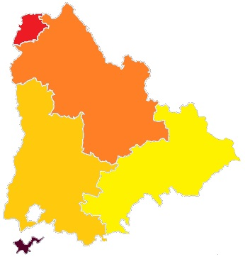 Découpage départemental de l’ancienne province du Dauphiné : en rouge : une partie du département du Rhône, en région Auvergne-Rhône-Alpes (communes rattachées à partir du milieu du XIXe siècle) ; en orange foncé : le département de l’Isère, en région Auvergne-Rhône-Alpes ; en orange pâle : le département de la Drôme, en région Auvergne-Rhône-Alpes ; en jaune : le département des Hautes-Alpes, en région Provence-Alpes-Côte d'Azur ; en bordeaux : une partie du département de Vaucluse, en région Provence-Alpes-Côte d'Azur (ancienne principauté d'Orange).